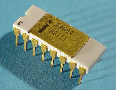 4-бітний процесор Intel 4004